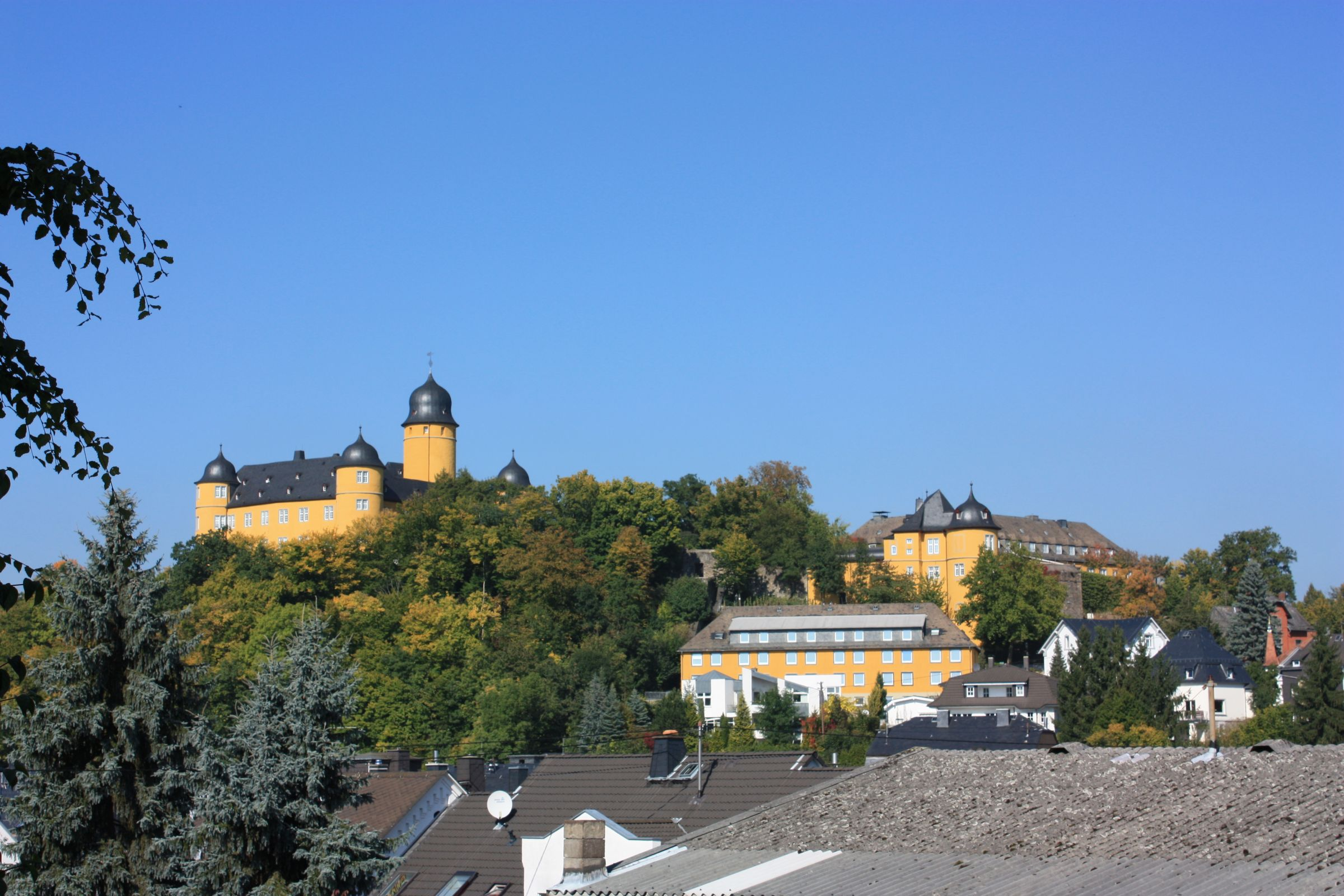 Das Schloss Montabaur, Rheinland-Pfalz von unterhalb des Wolfsturm aus gesehen